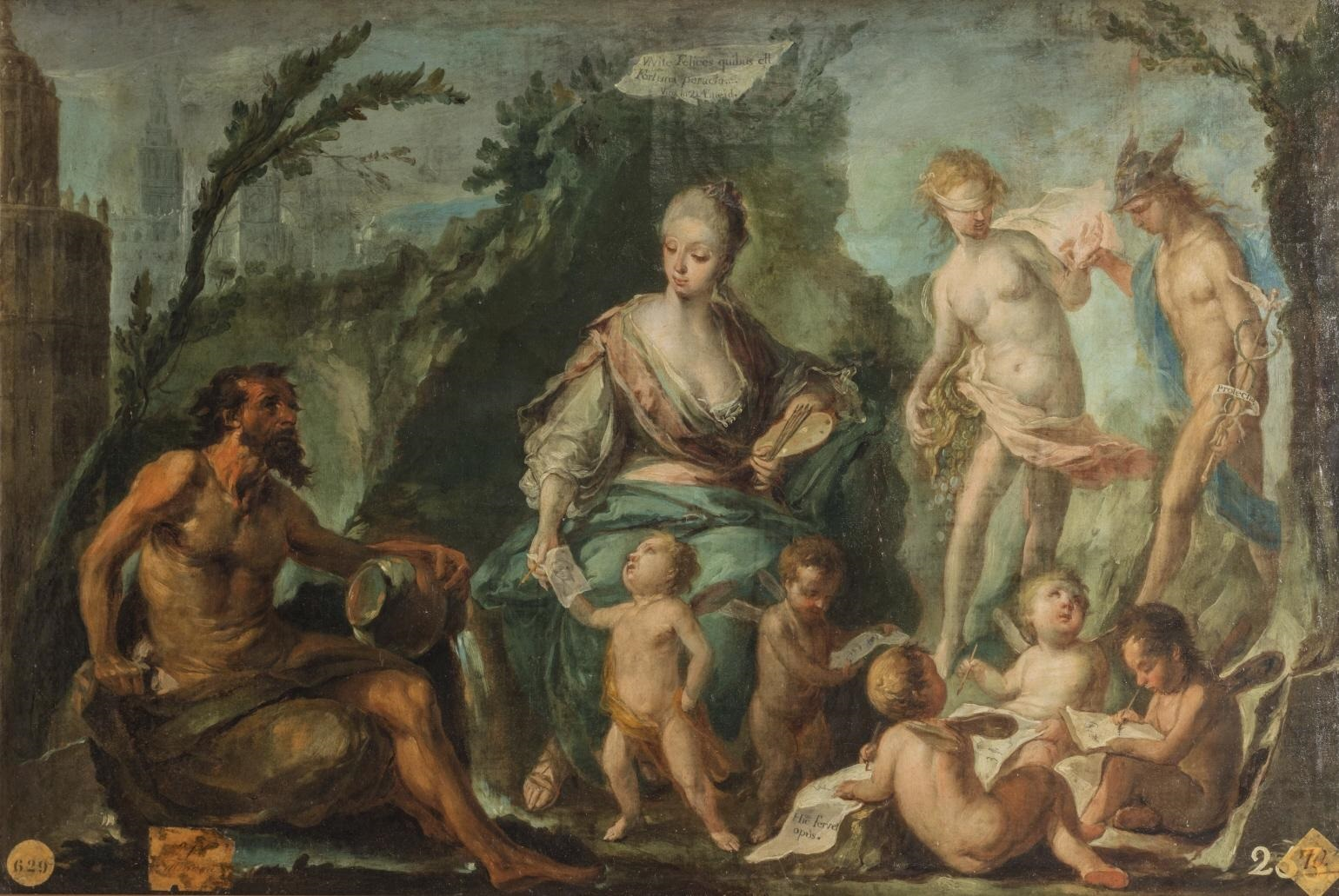 La obra es una alegoría de la llegada de la pintura a la ciudad de Sevilla, en España.